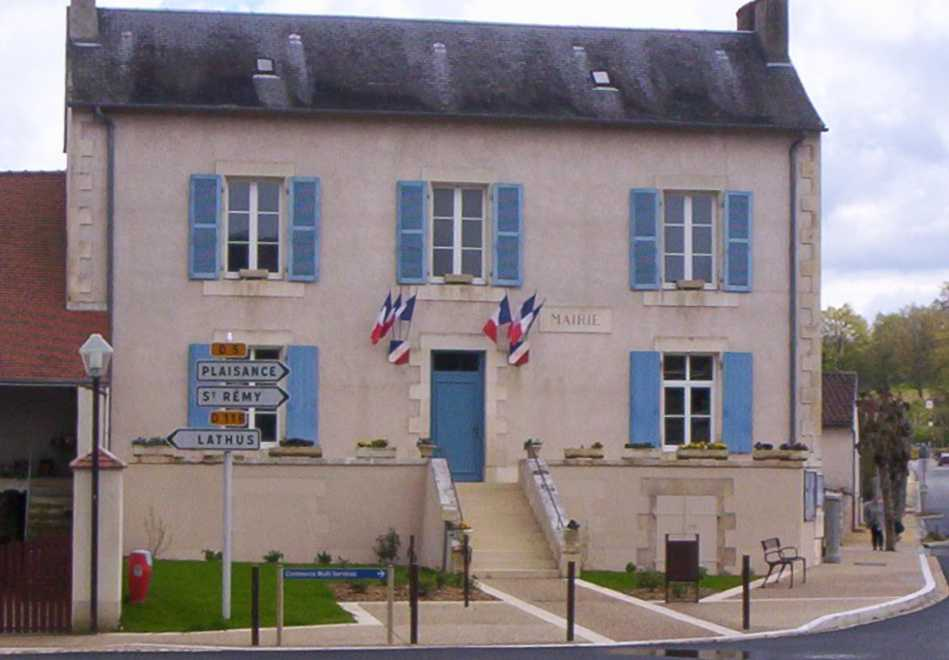 Mairie de Saulgé, Vienne, France